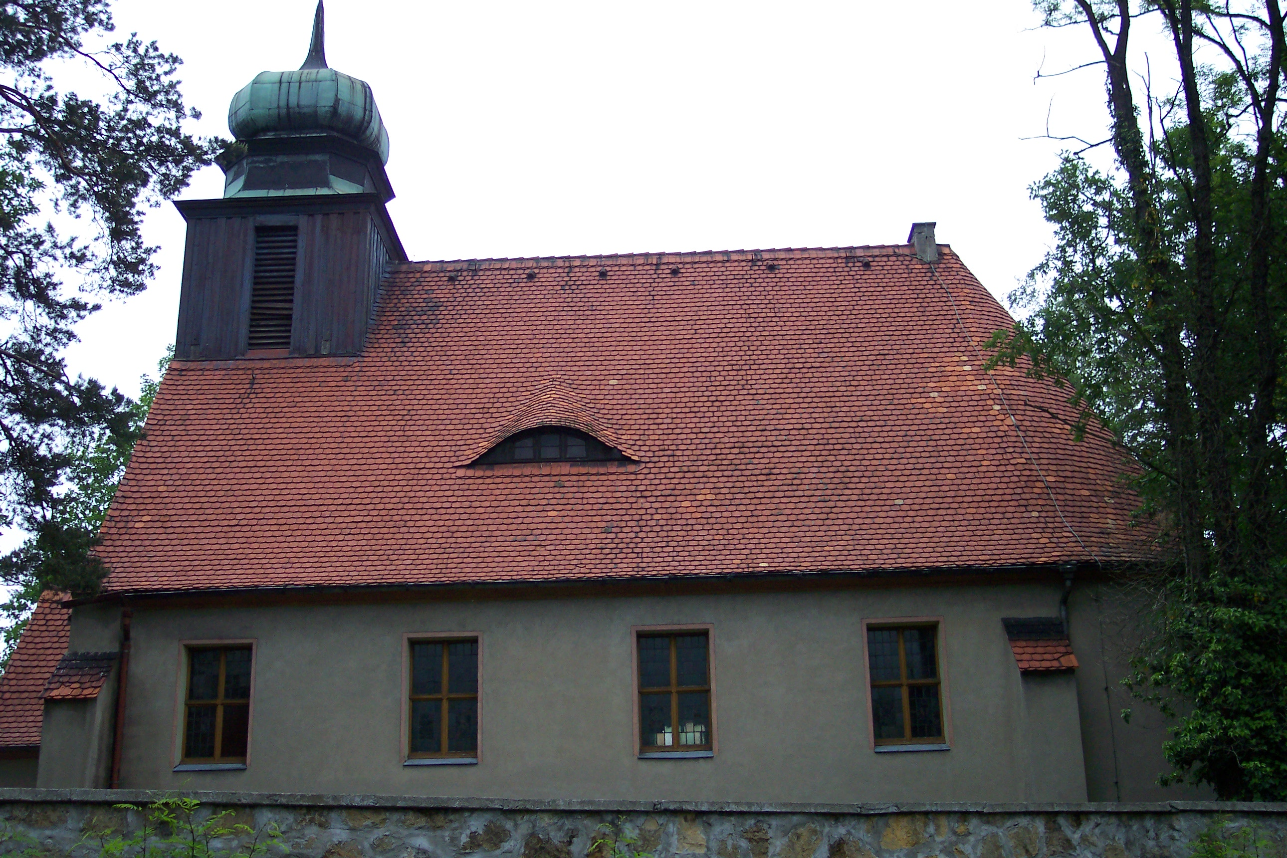 Evangelische Kirche in Kolonowskie/Polen